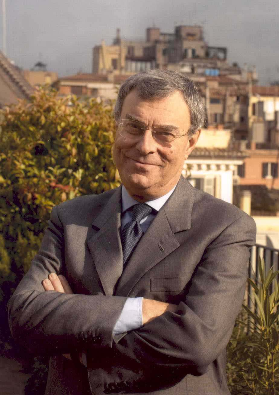 Foto di Giuliano Segre